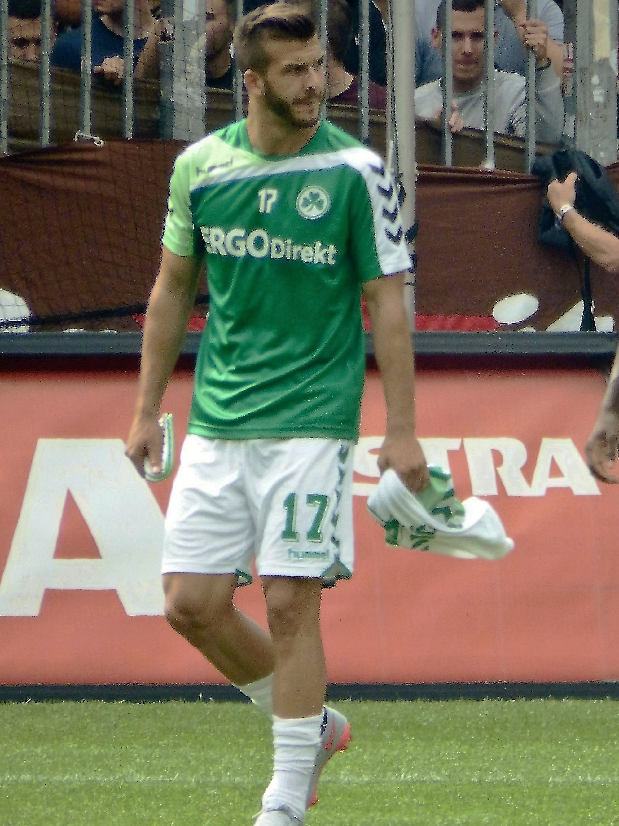 Tripić, Zlatko Greuther Fürth